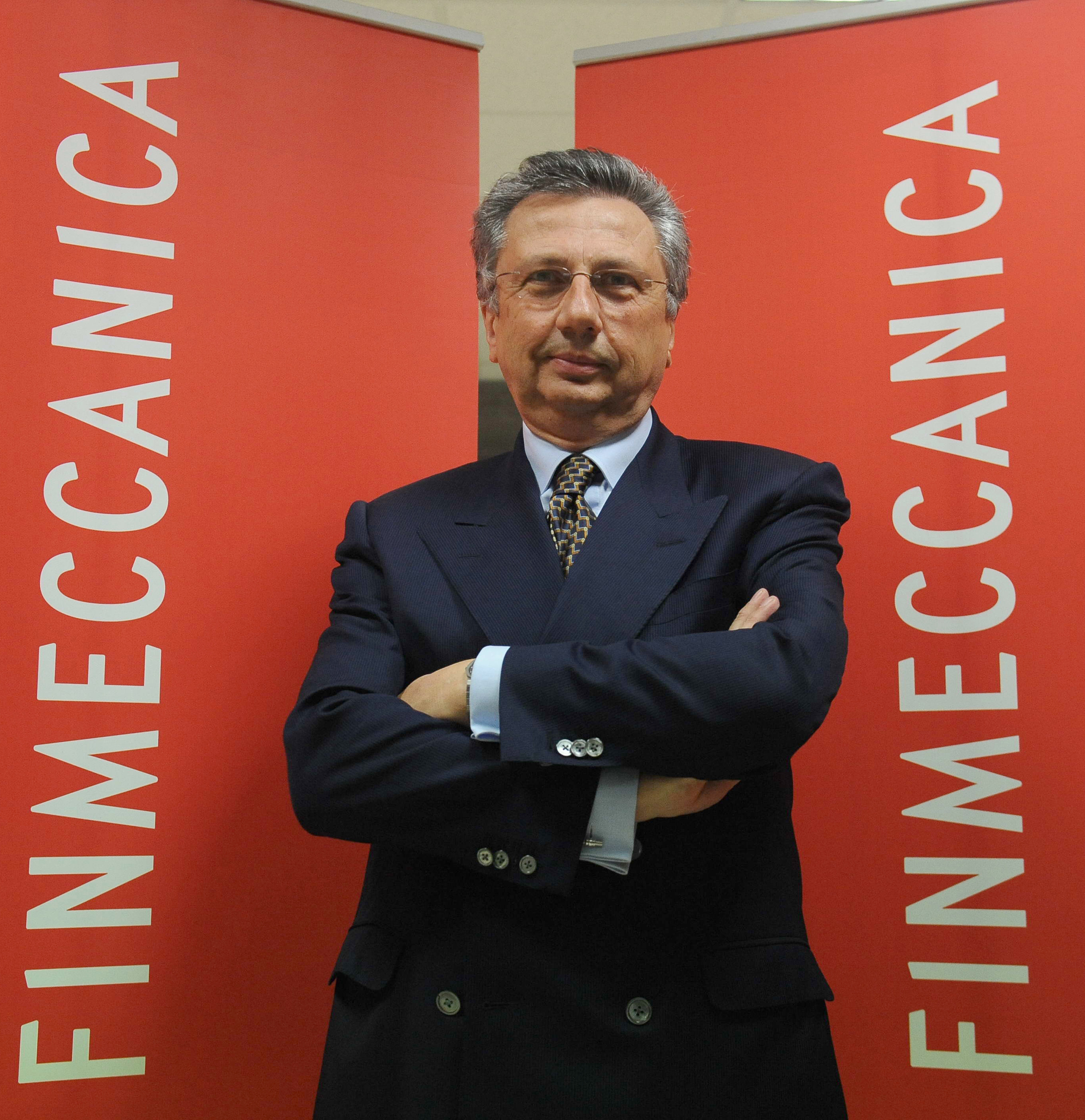 Giuseppe Orsi è Amministratore Delegato e Presidente di Finmeccanica Spa